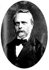 Portrait d'Auguste Liébeault